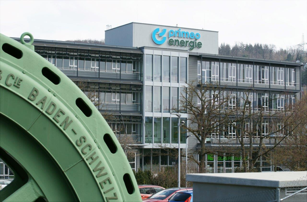 Primeo Energie Sitz Münchenstein, Verwaltung